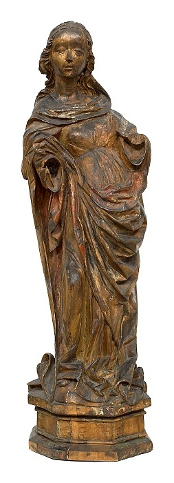 Panna Marie (70.-80. léta 15. stol.)